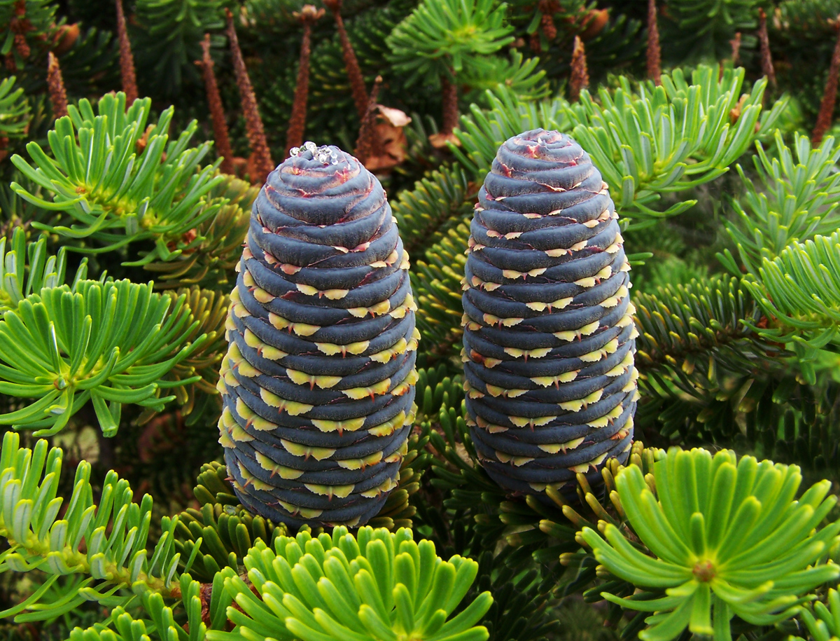 Strobiloj de korea abio (Abies koreana)